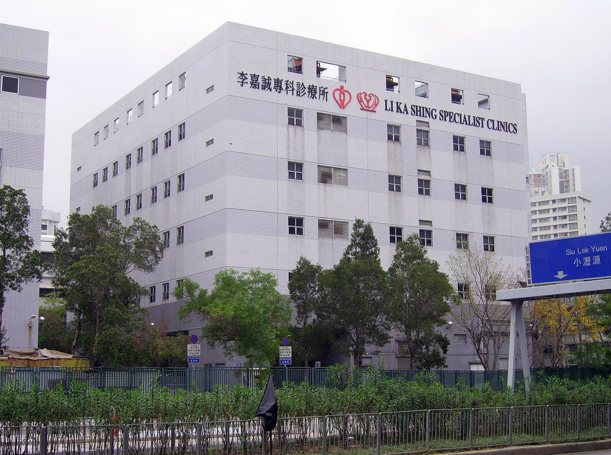 李嘉誠專科診所